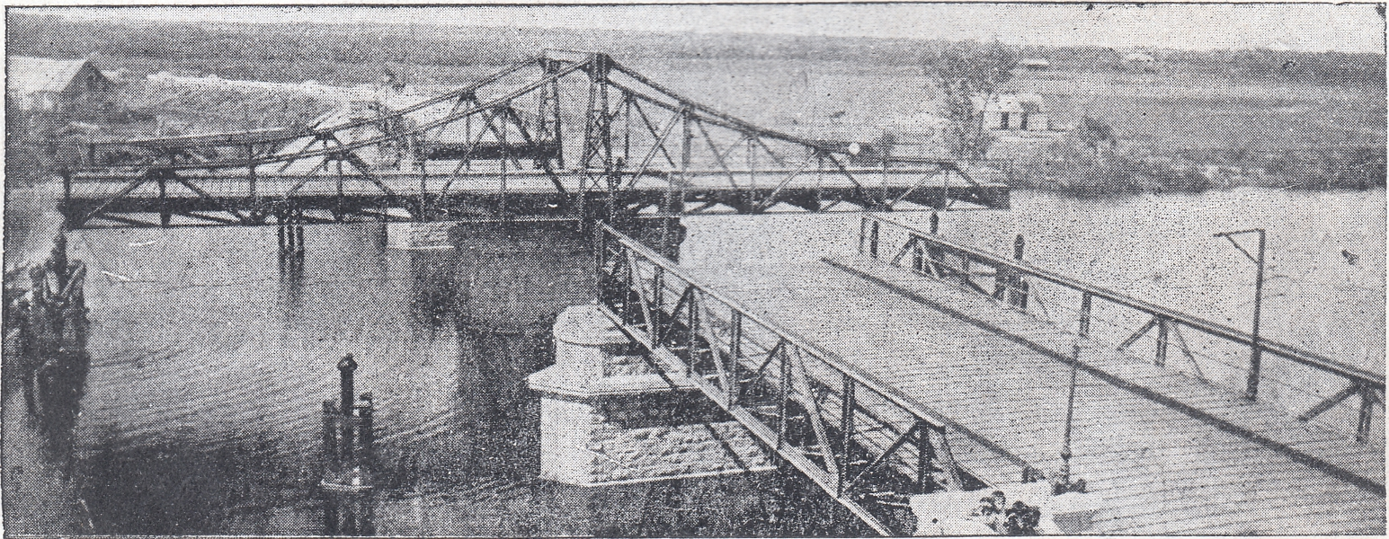 Fotografía del puente giratorio de Carmelo (Uruguay) al momento de su inauguración, el 1 de mayo de 1912